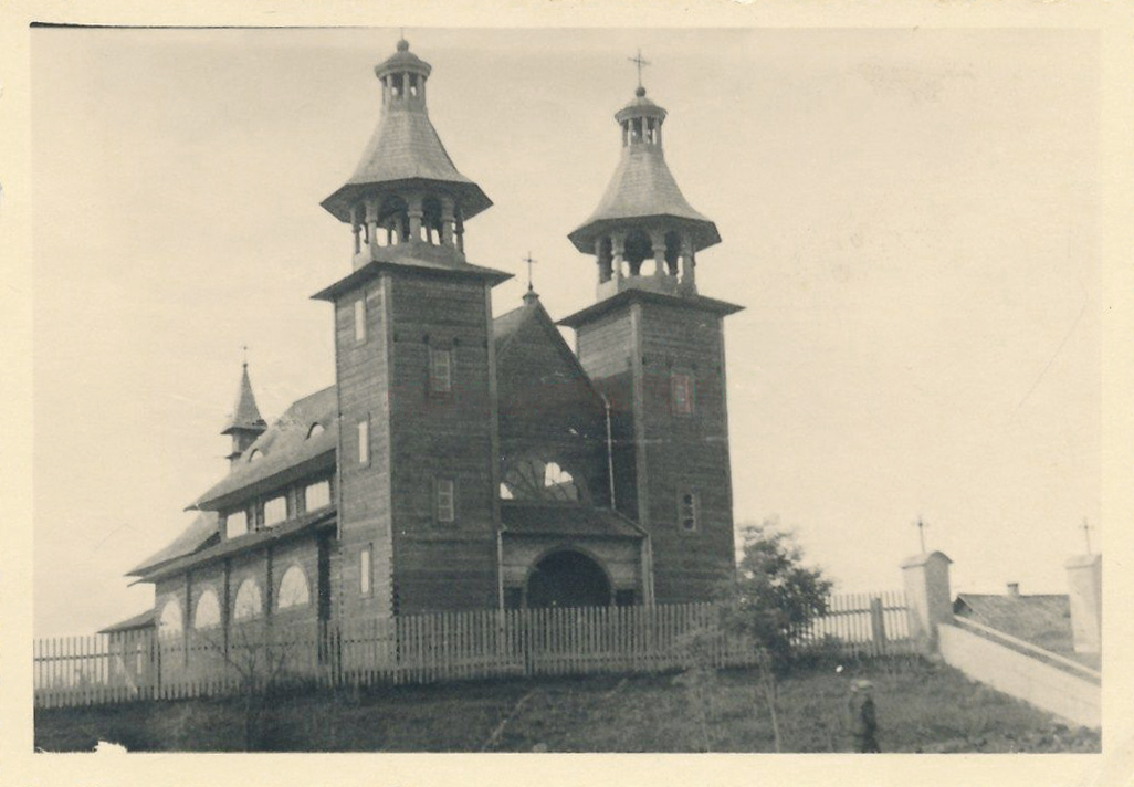 Беларуская (тарашкевіца): Астрына (Astryna). Касьцёл